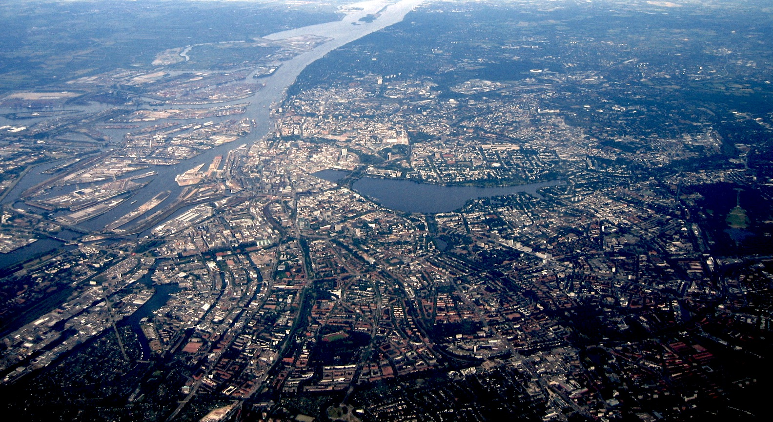 Hamburg während eines Überfluges.